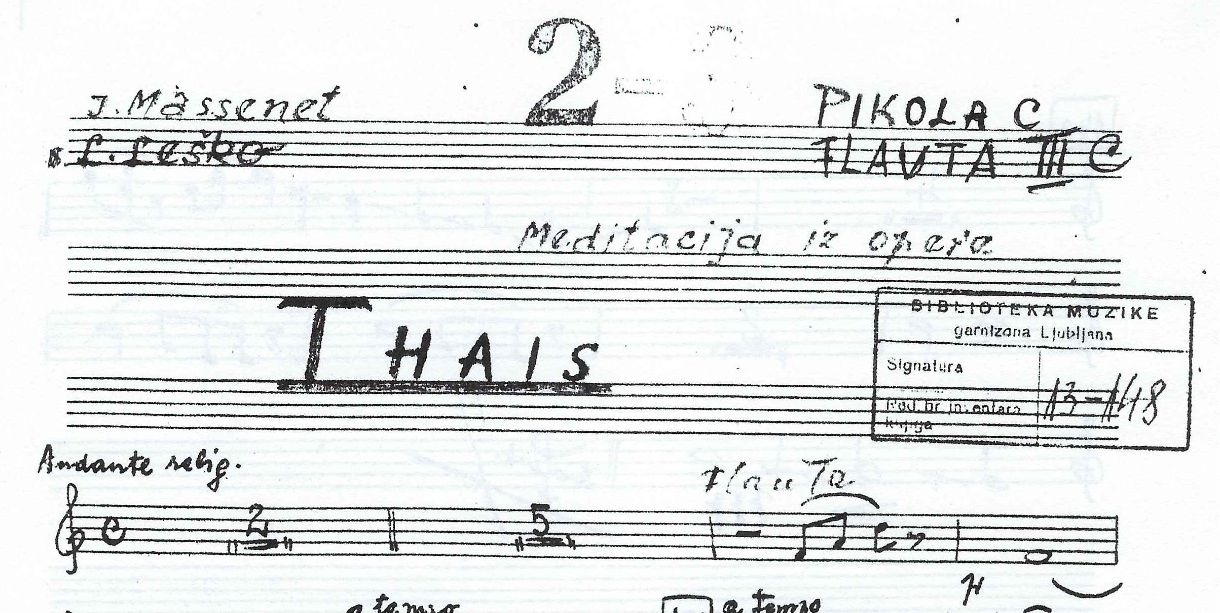 Fragment skladbe Thais